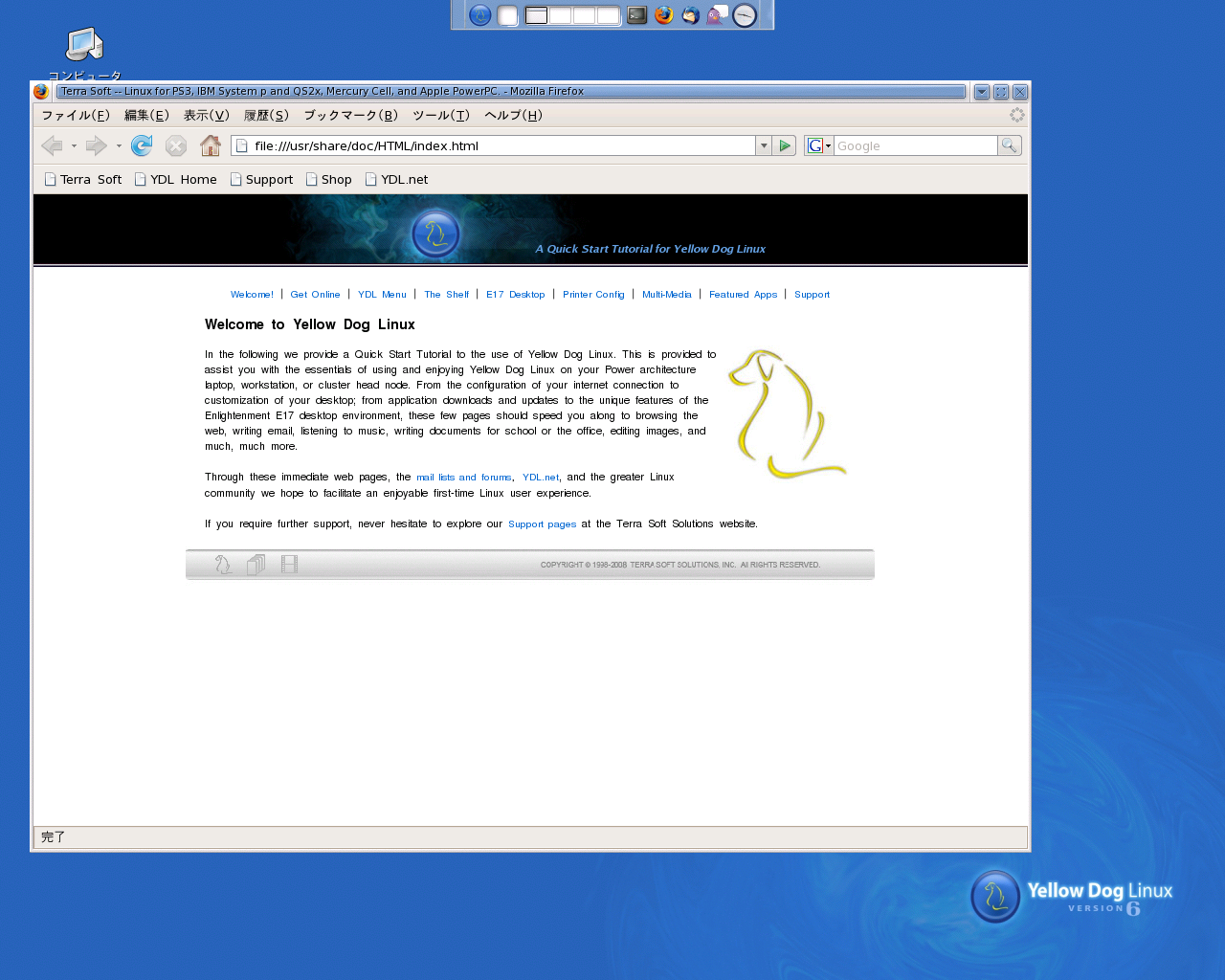 YellowDog Linux 6.0 日本語インストール (E17 Desktop + Firefox)